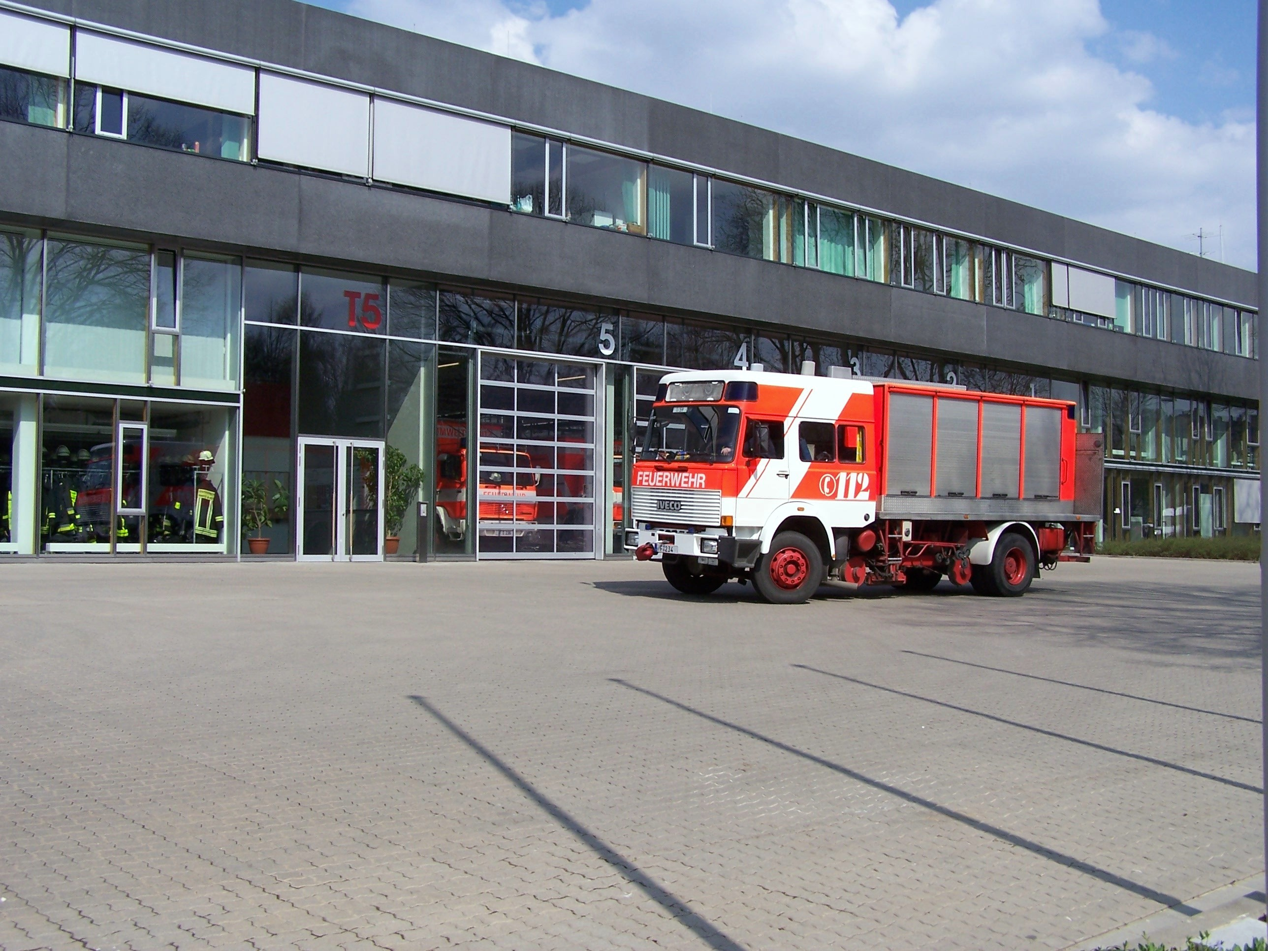 Rüstwagen-Schiene der Berufsfeuerwehr Frankfurt am Main in der Bereichsleitungswache 1